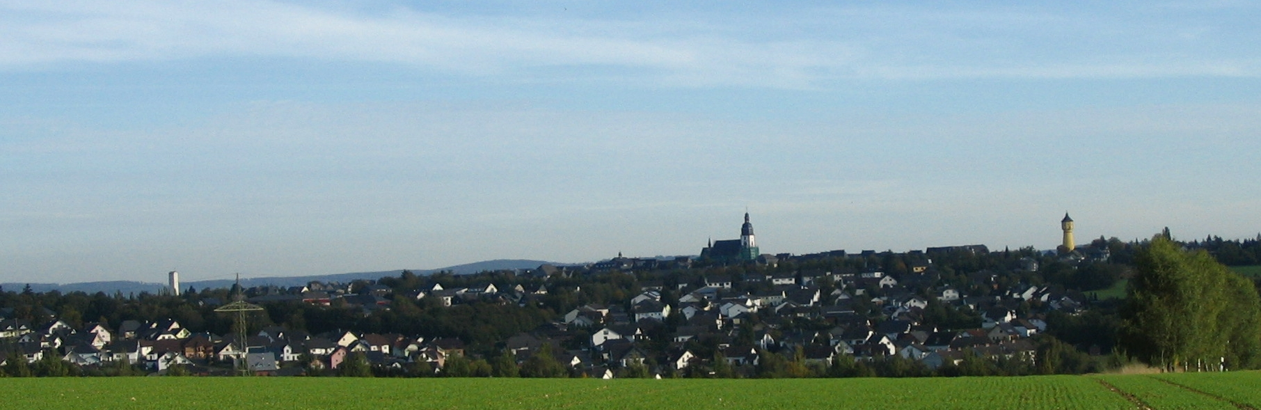 Kirchberg mit den drei Türmen Wasserturm, Michaeliskirche, Friedenskirche